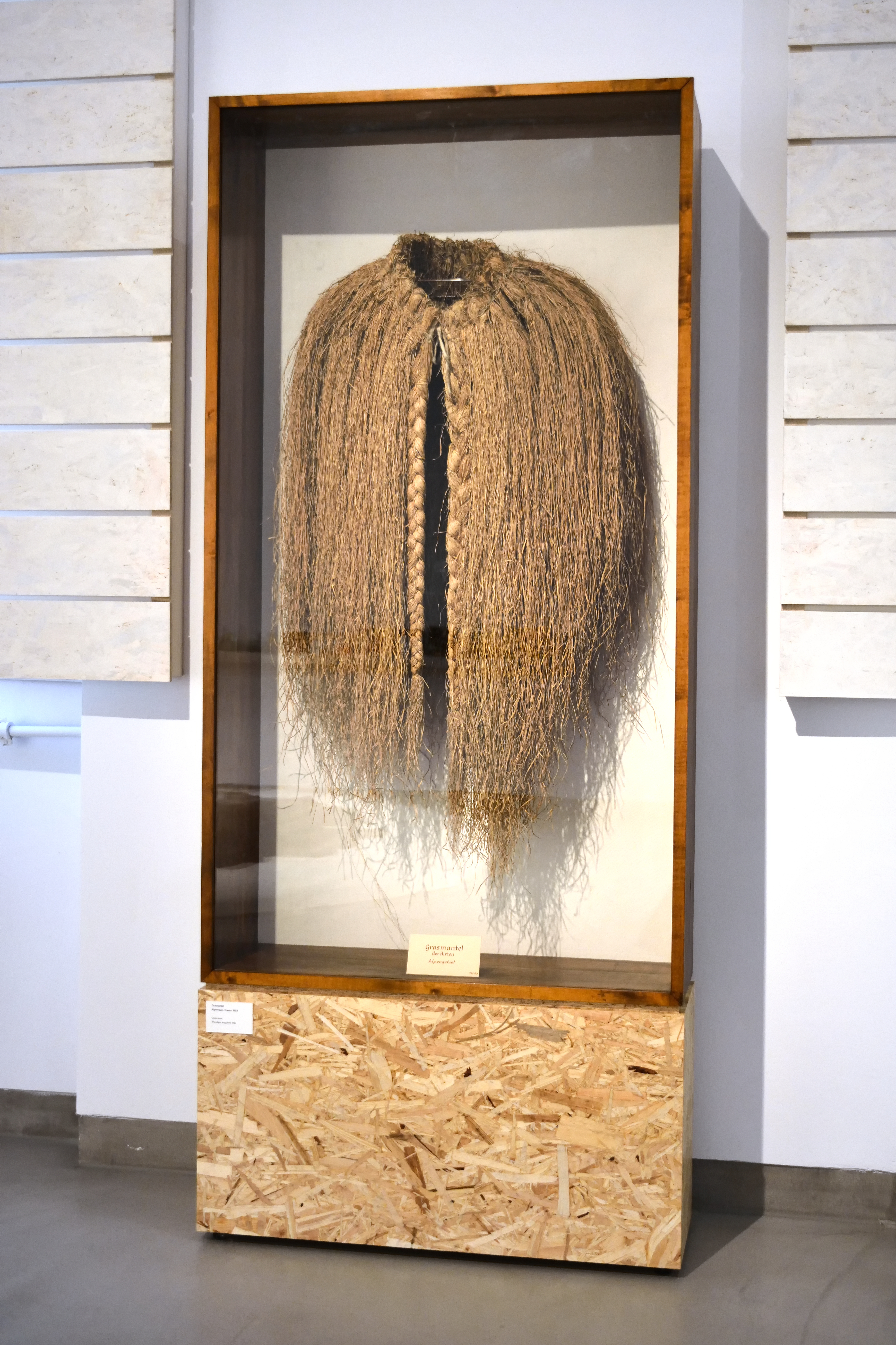 Impressionen aus dem Museum Europäischer Kulturen. Sonderausstellung 100 Prozent Wolle vom November 2017 bis Juni 2019. Ausstellungsstück: Grasmantel der Hirten aus den Alpen.[1]